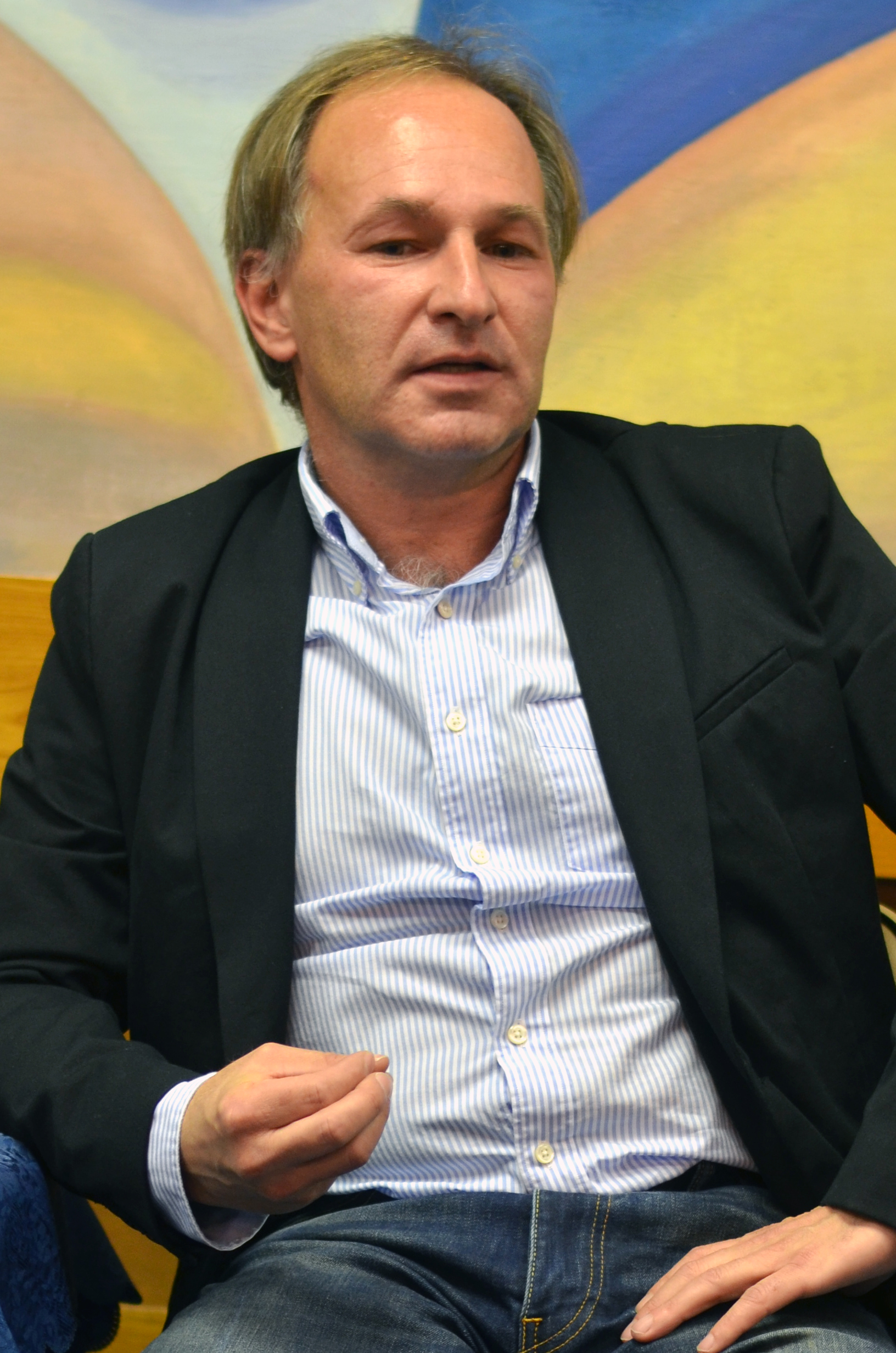 Marek Wollner na besedě v Adamově